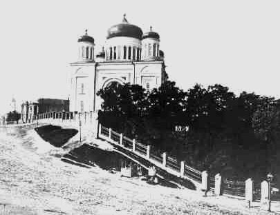 Вид Десятинной церкви в 19. веке